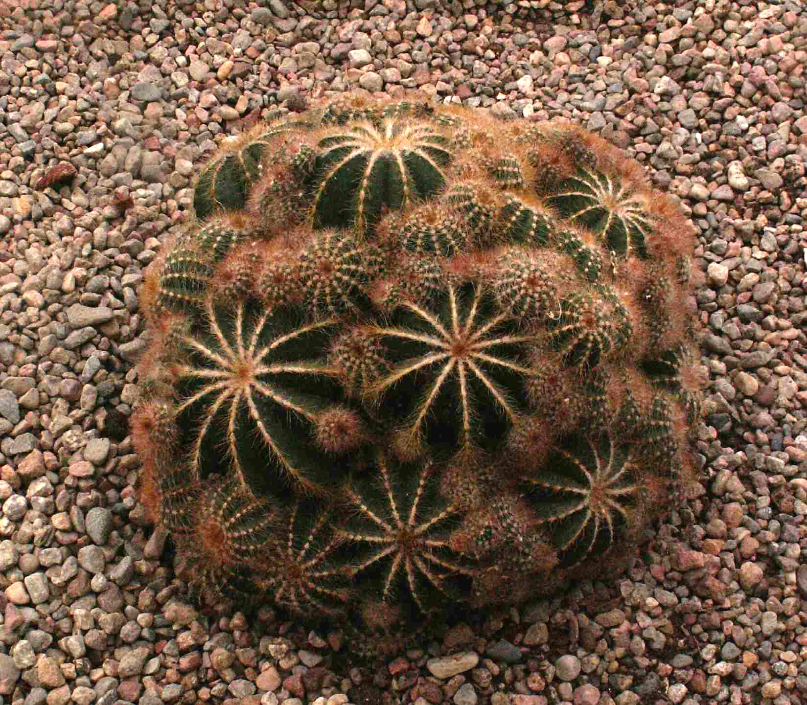 cacti